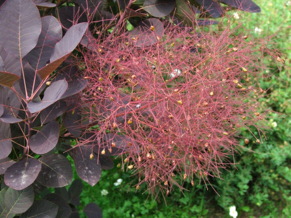 Cotinus coggyria (pl.Perukowiec podolski), Family: Anacardiaceae